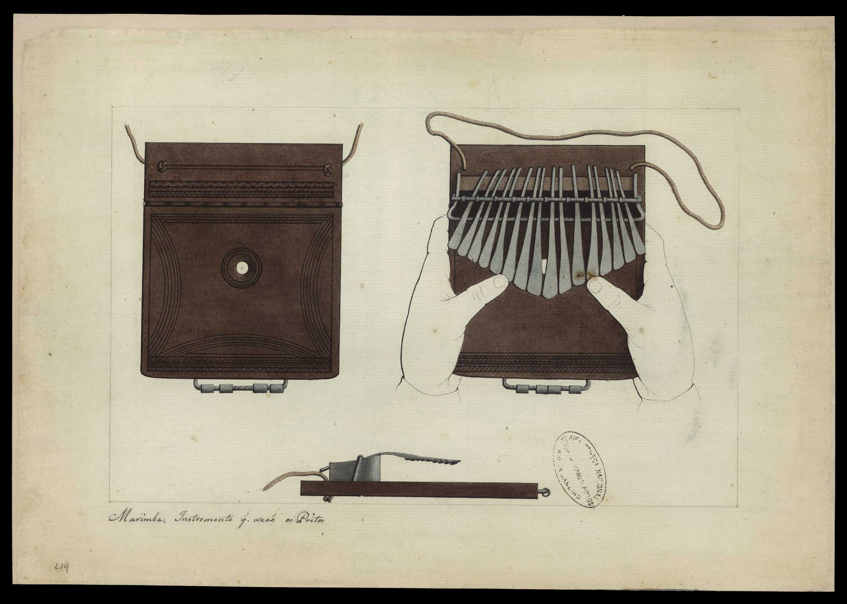 Estampa contendo 3 desenhos, correspondentes às posições inferior, superior e lateral de um mesmo objeto de madeira, com espécie de teclado. Inclui desenho de mãos segurando tal